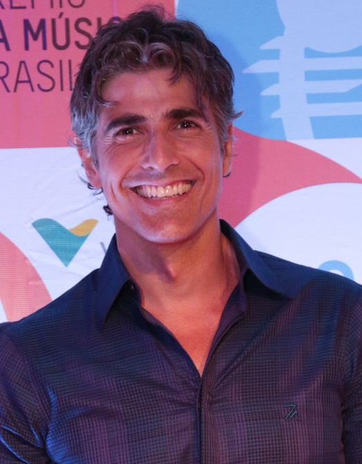 Reynaldo Gianecchini durante o 25º Prêmio da Música Brasileira no Theatro Municipal